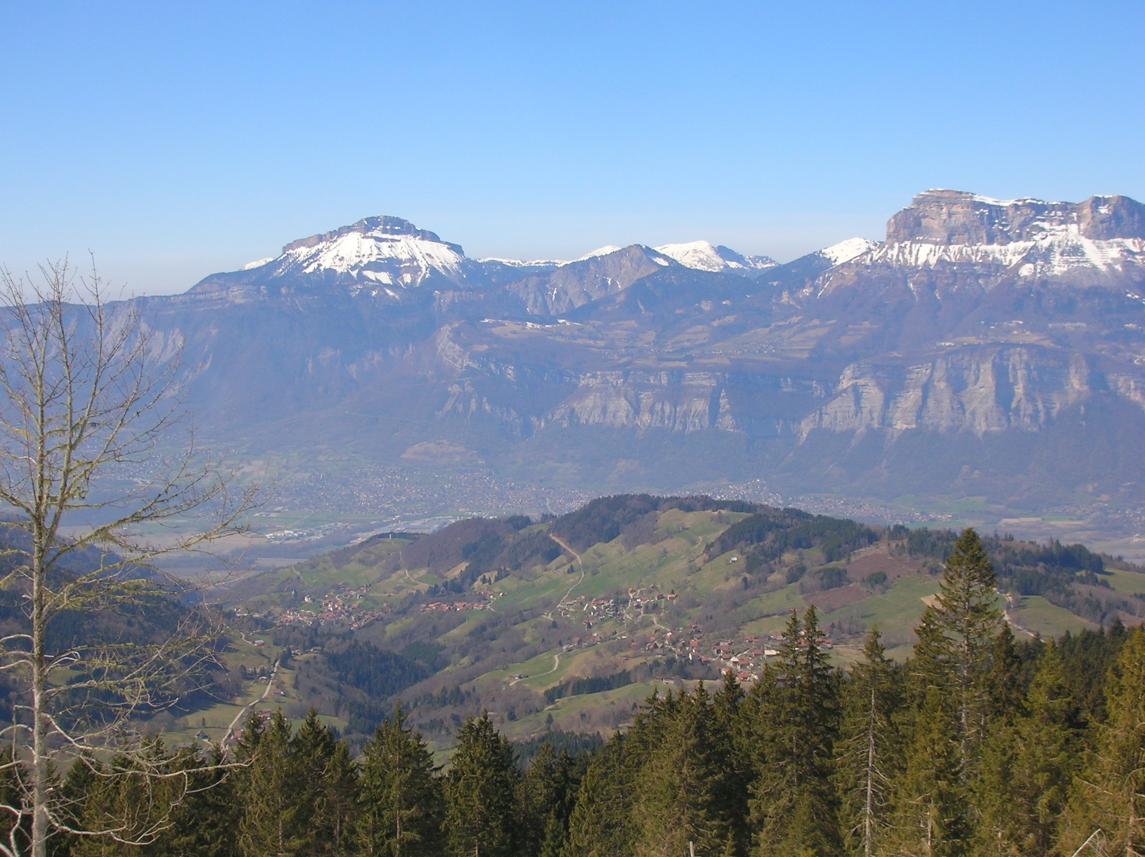 Les Adrets et Laval depuis le domaine nordique de Prapoutel (Les 7 Laux), en fin de saison. Les Adrets, Isère, France.